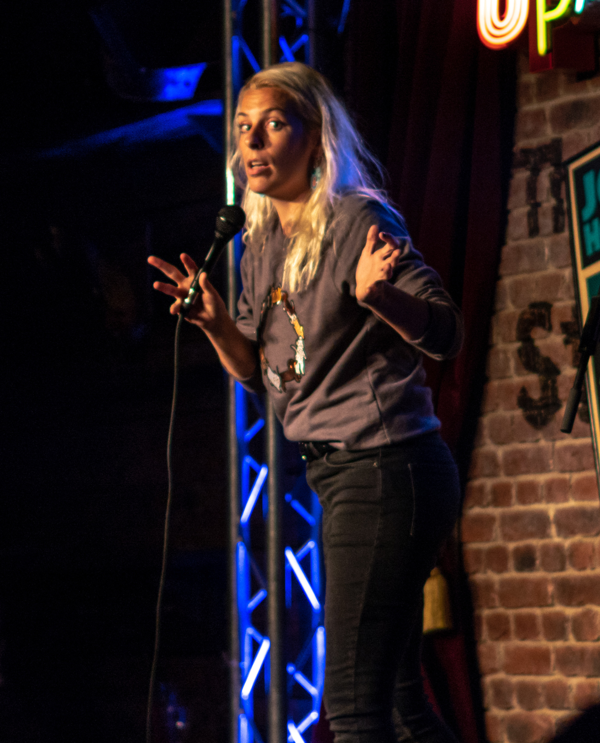 LycettPascoeGreen290518-5